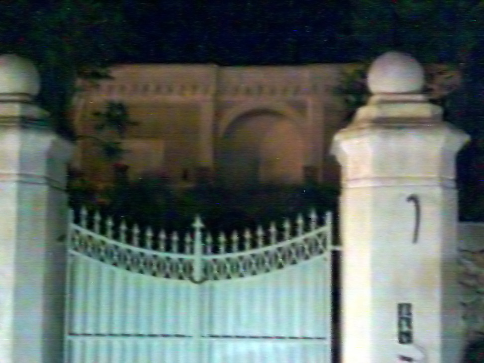 torre san gregorio ricostruita come villa